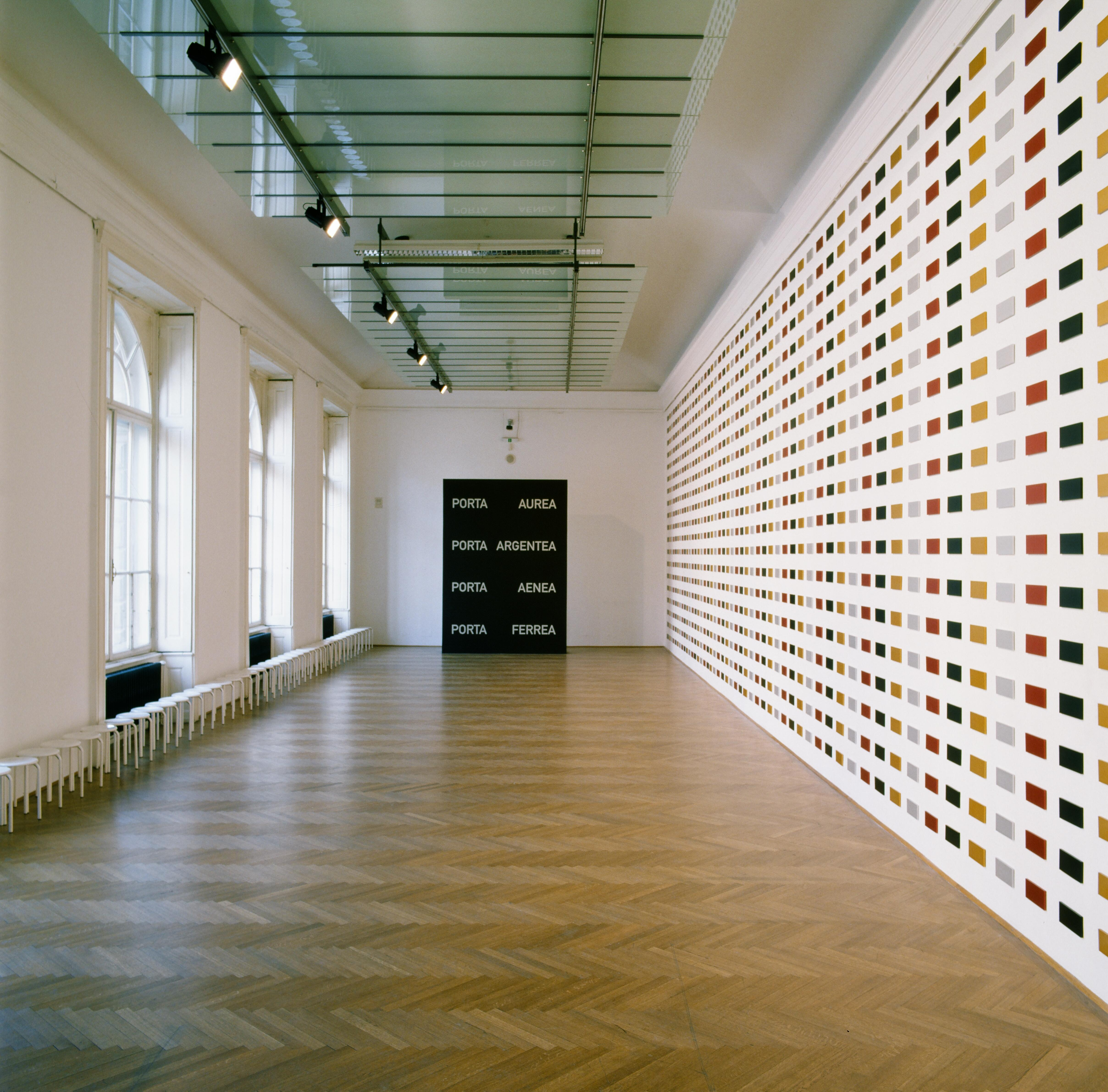 Georg Salner, Rauminstallation SU.SY, Österreichisches Museum für angewandte Kunst, MAK-Galerie, Wien, 1998/99 Ausstellungsdetail: Wandgestaltung Metallon, eloxierte Aluminiumplatten à 10 x 21 x 1 cm